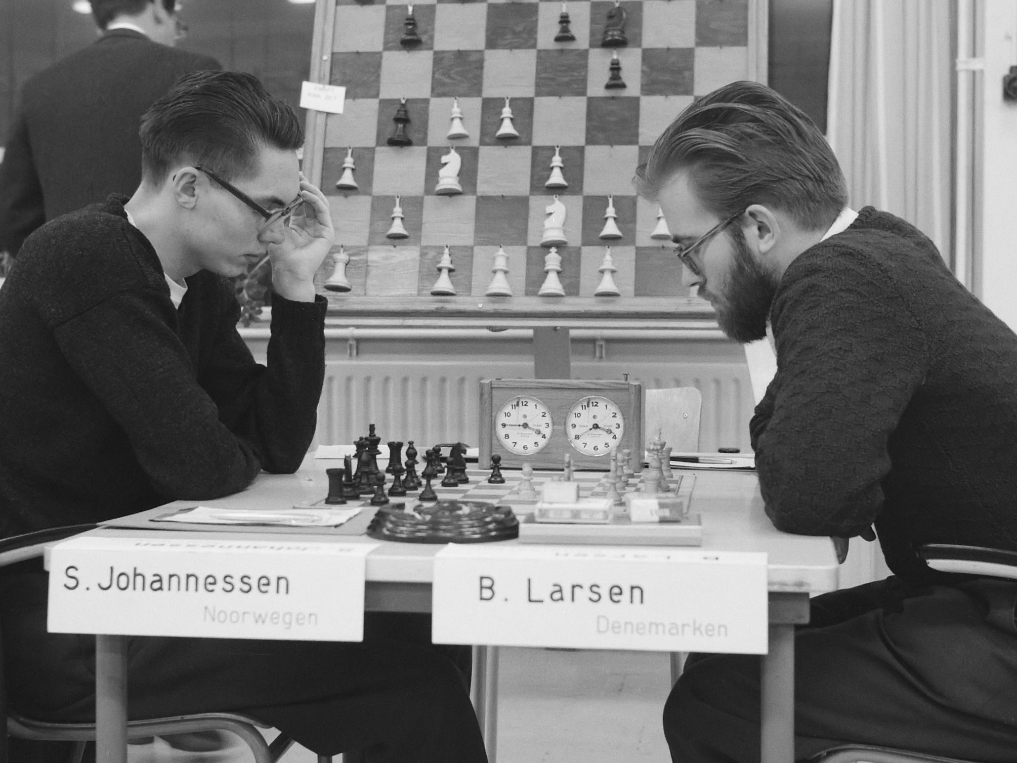 Zone-schaaktoernooi te Berg en Dal, Johannessen (l) tegen B. Larsen 1 december 1960